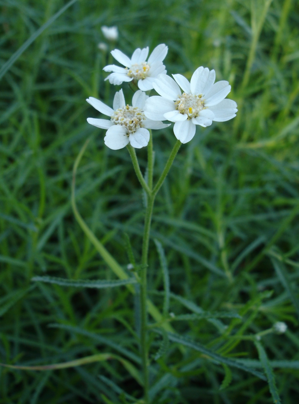 Achillea ptarmica, Forêt de Rambouillet